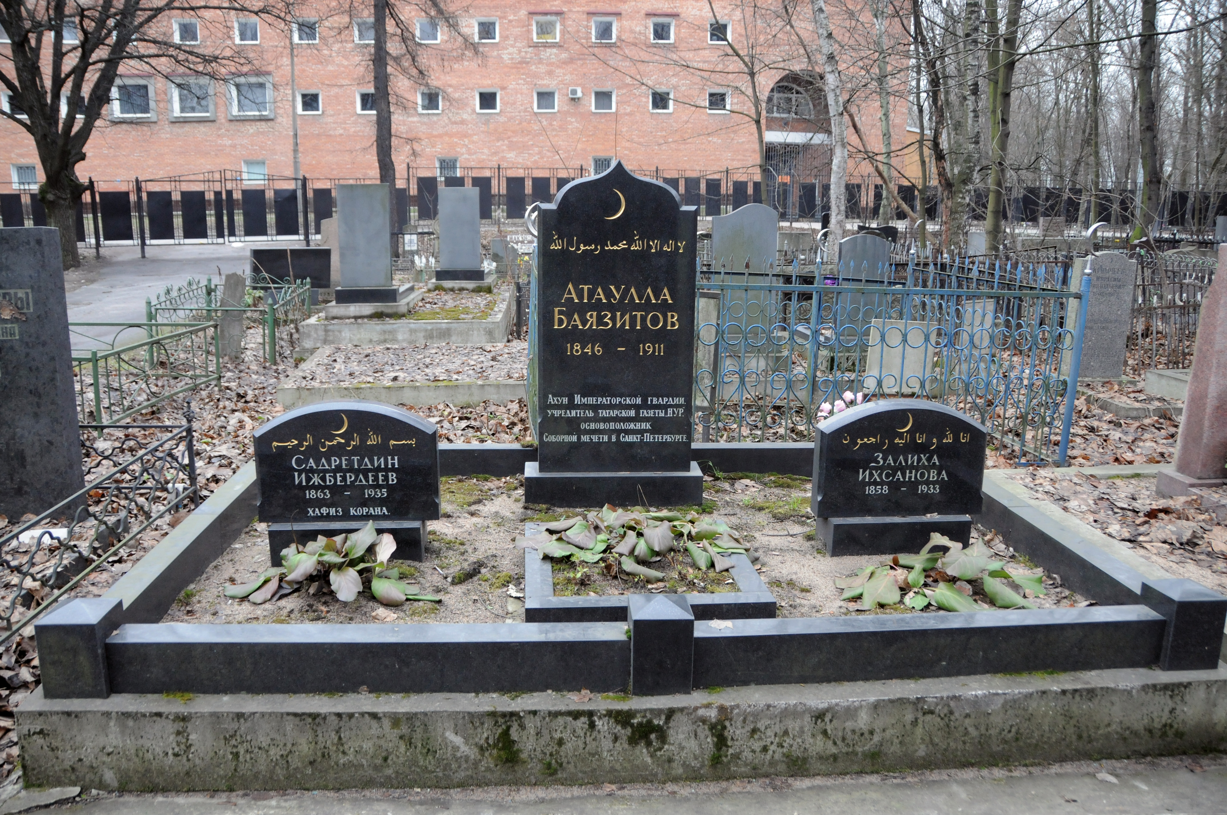 Кенотаф Атауллы Баязитова на Магометанском кладбище в Санкт-Петербурге